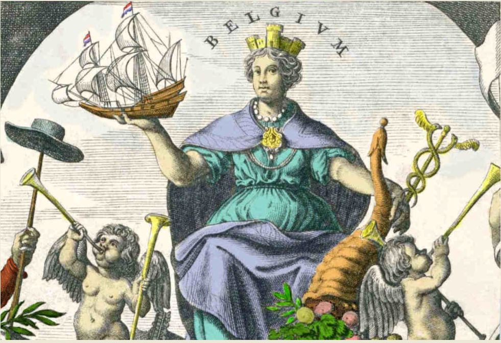 Titelblad: Meteranus Novus, Das ist Warhafftige Beschreibung Deß Niederländischen Krieges, anno 1640